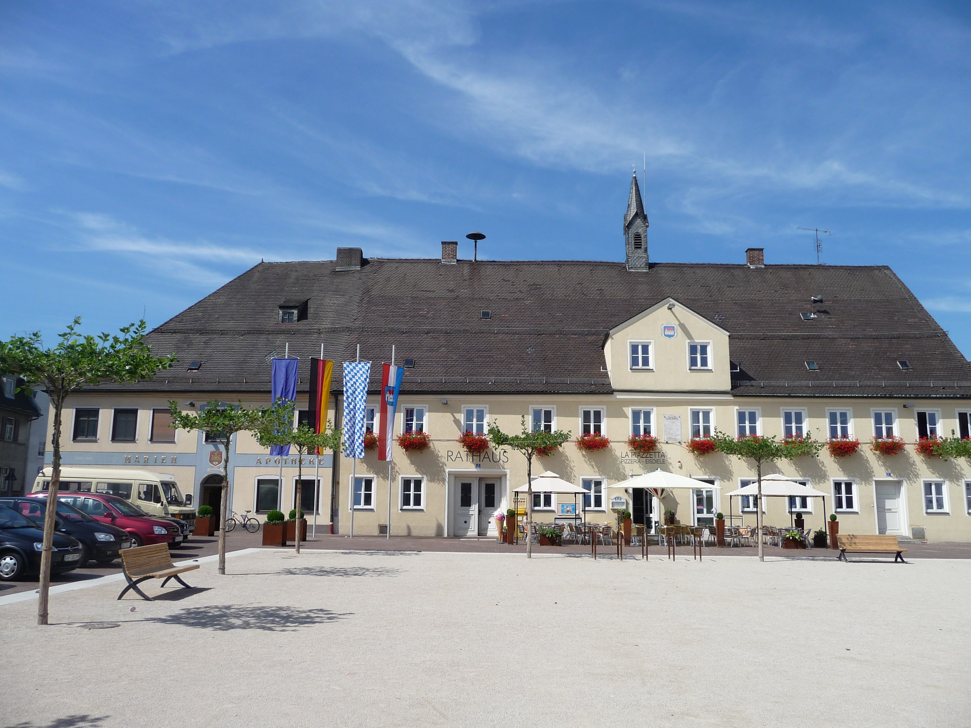 Der Gebäudetrakt aus Rathaus und Apotheke am Marktplatz Frontenhausen